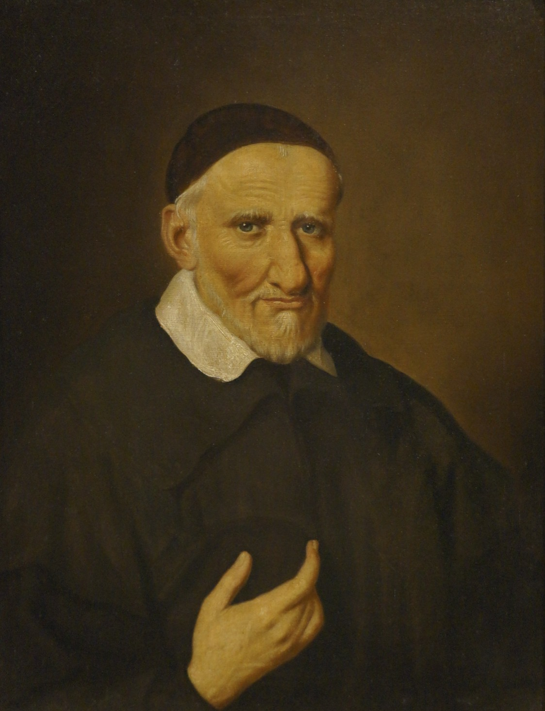 San Vicente de Paul Juan Nepomuceno Herrera 1859 Óleo sobre tela